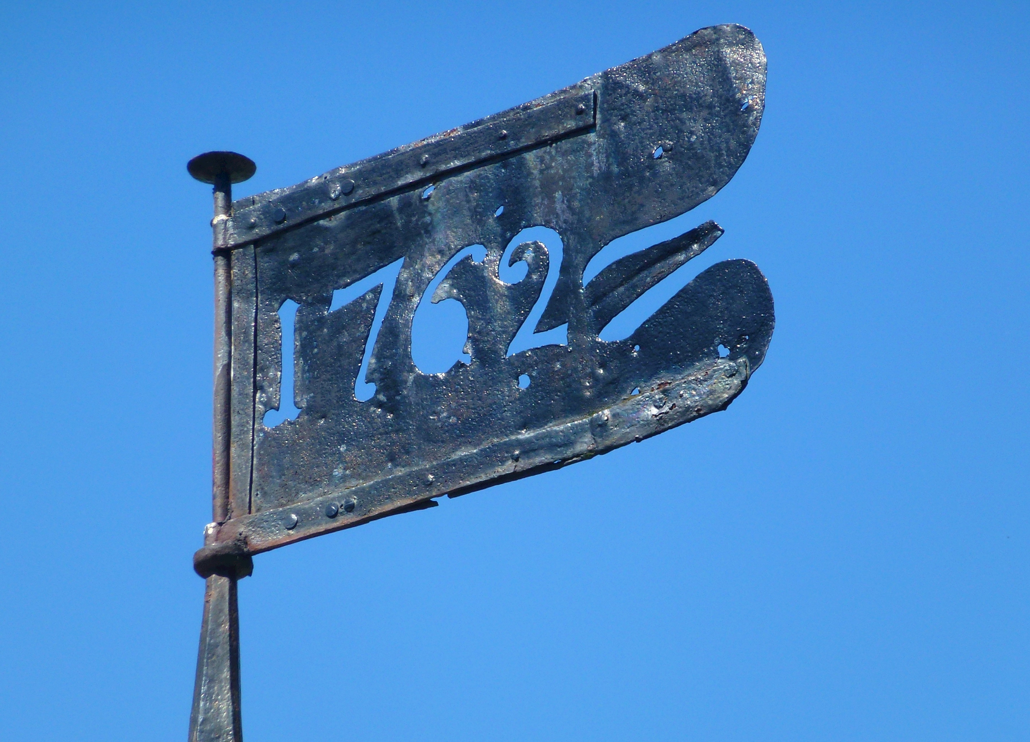 Körunda gård, vindflöjel på yttre norra flygeln